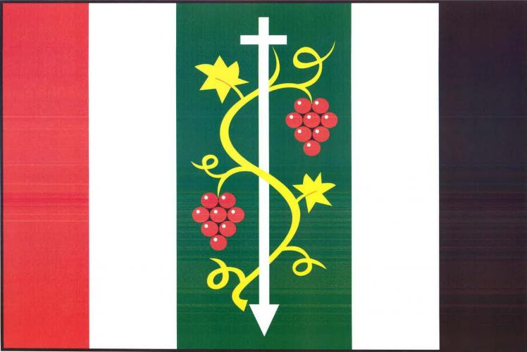 vlajka, Valtrovice, okres Znojmo